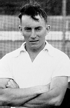 Ken Meuleman